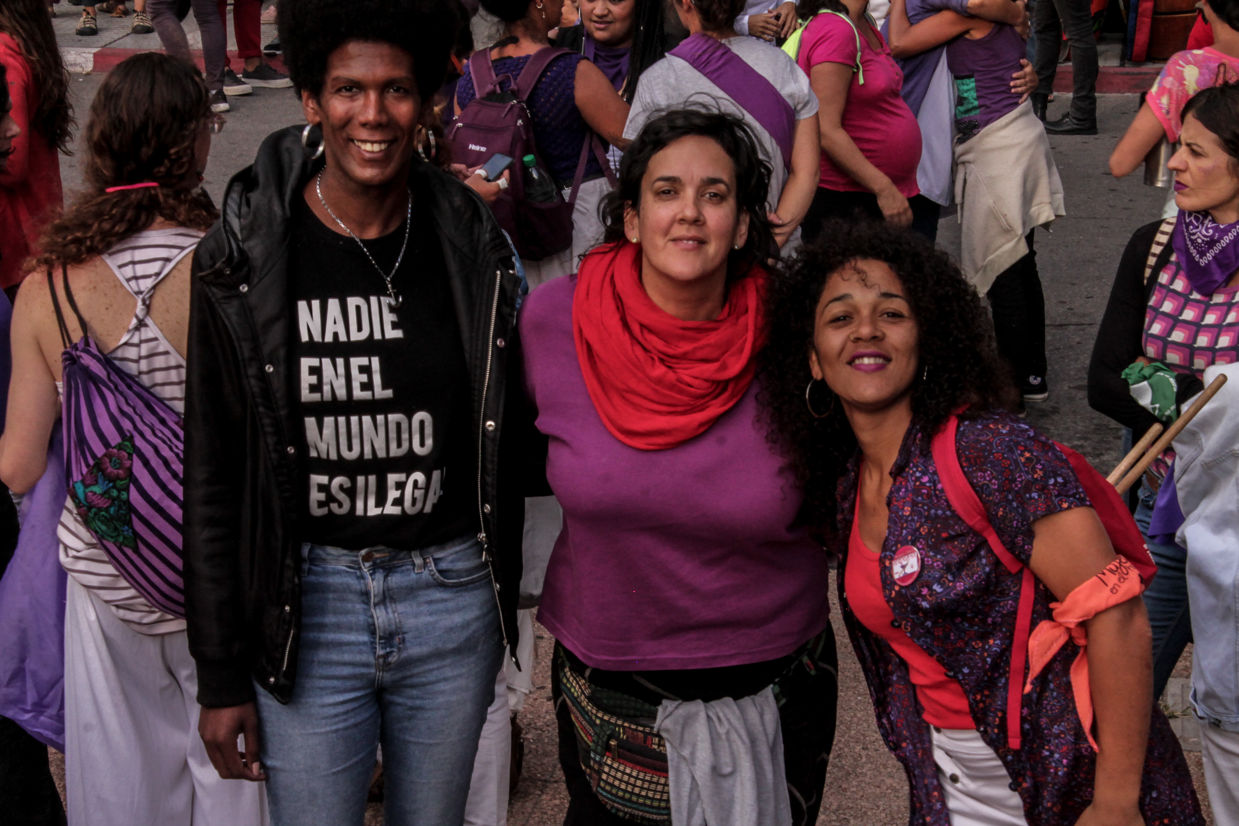 Los grupos La Melaza y Afrogama marcharon desde el candombe, en el marco de la Huelga Feminista del 8 de marzo de 2019. Cobertura colaborativa 8M2019.